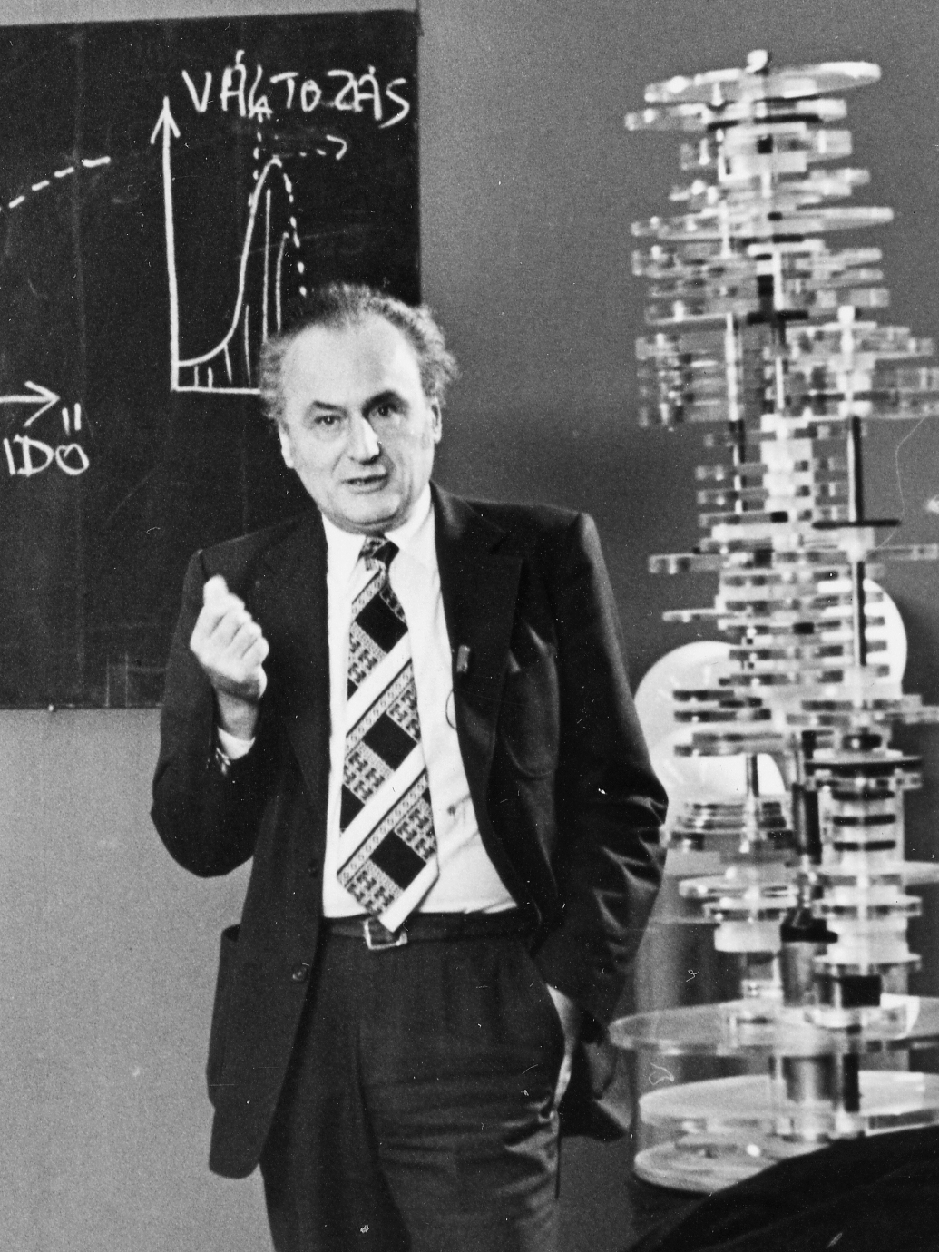 Marx György fizikus professzor